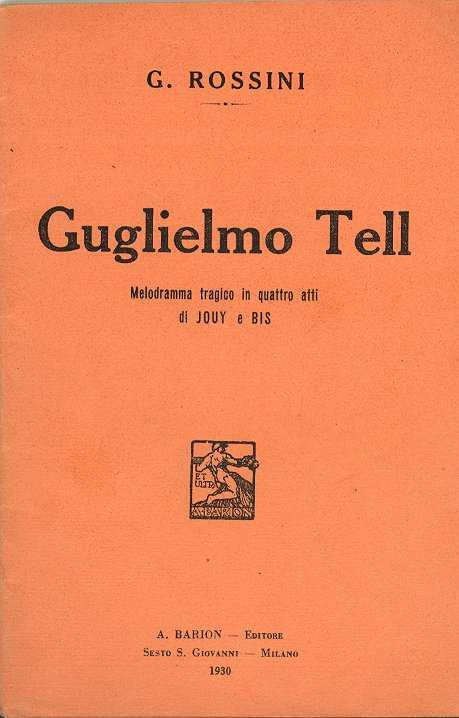 Copertina libretto "Guglielmo Tell" melodramma tragico in quattro atti di Jouy e Bis musica di G. Rossini - editore Attilio Barion Sesto San Giovanni - Milano 1930